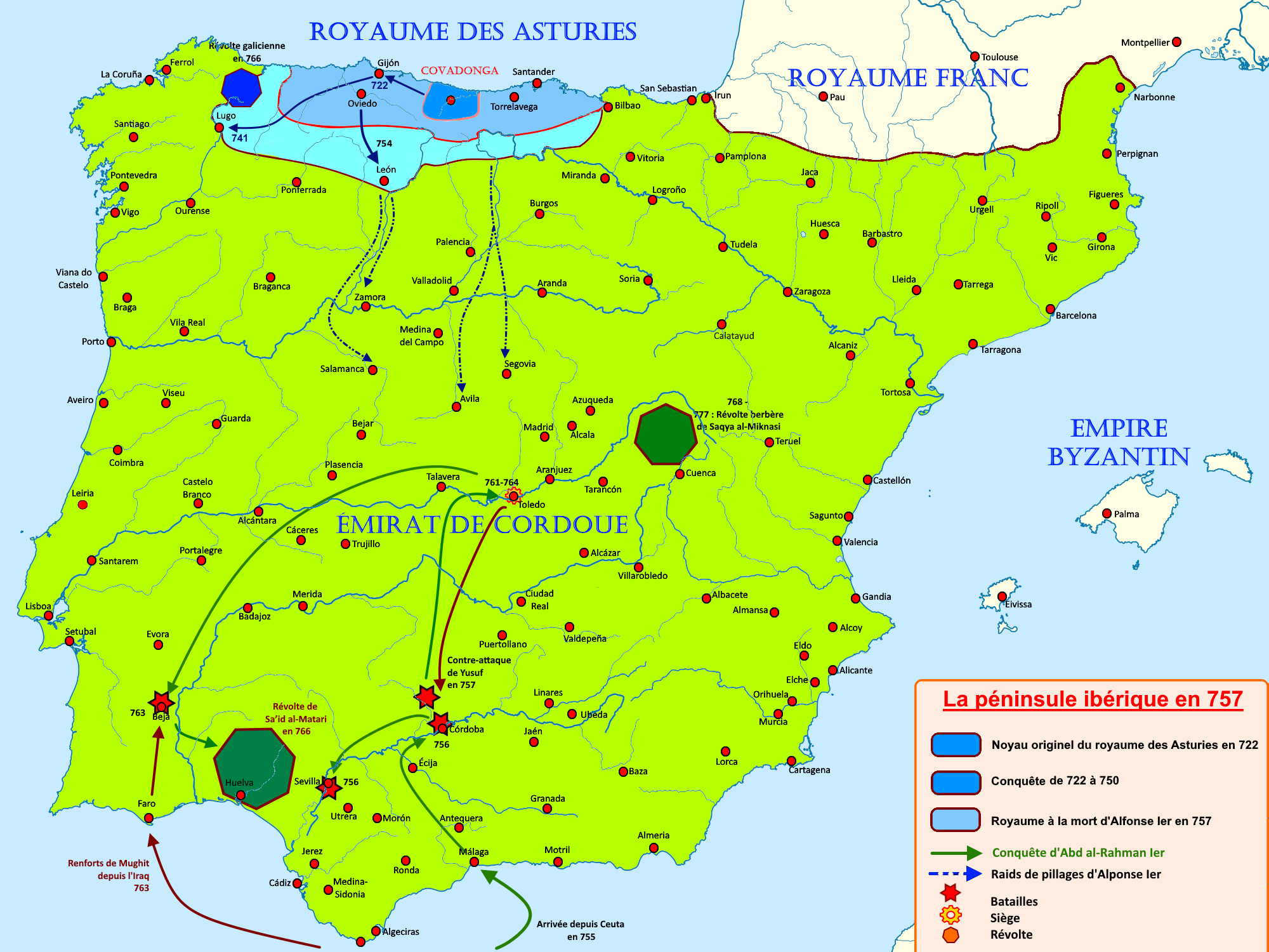 Carte de la péninsule ibérique en 757 avec l'essor du royaume des Asturies